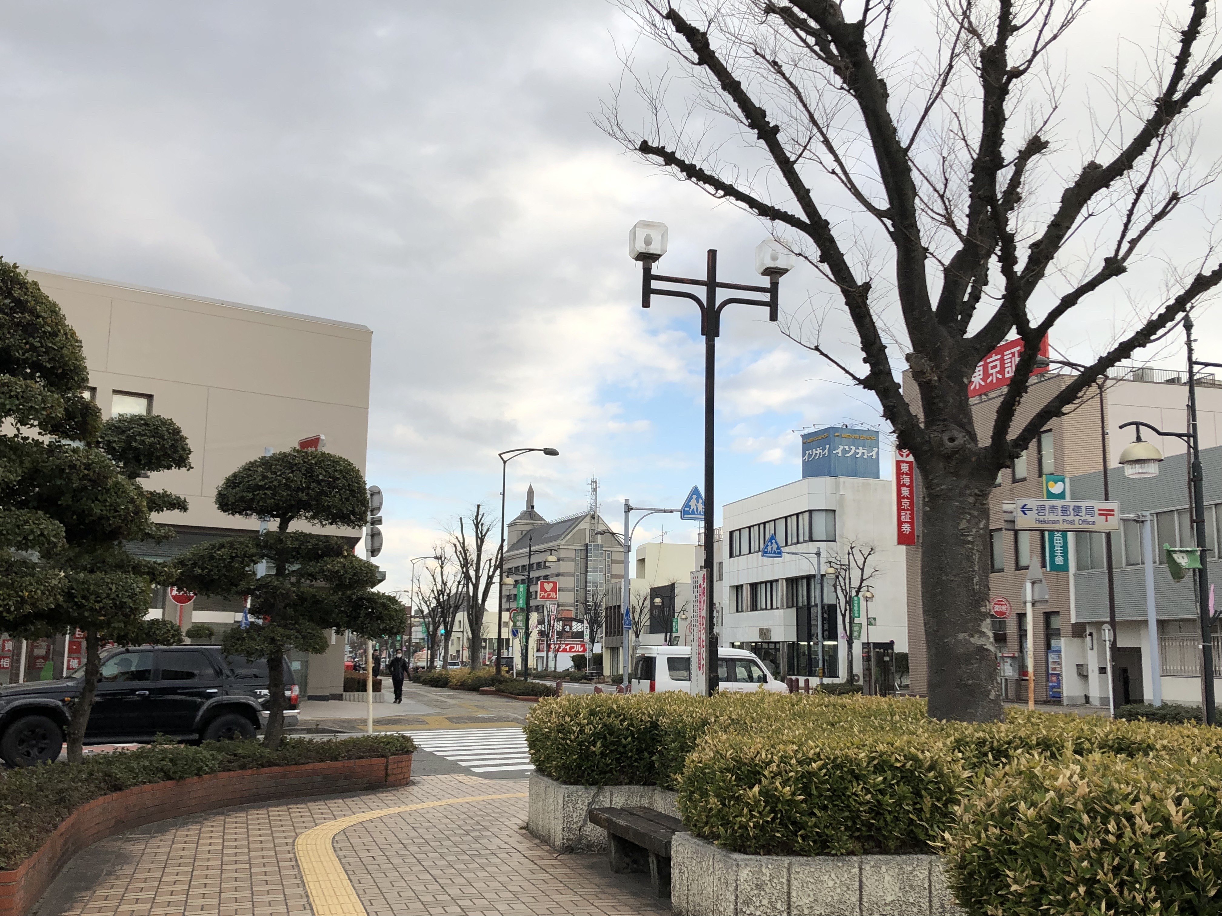 碧南中央駅前1